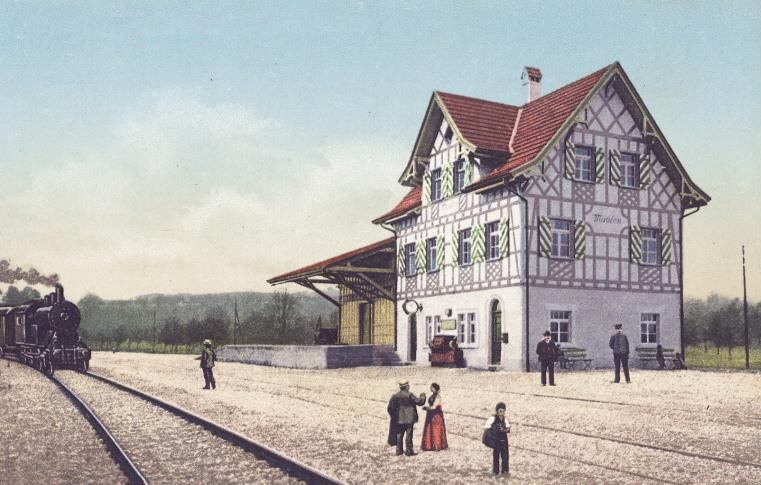 Bahnhof Muolen mit einem einfahrenden Dampfzug, Lithographie